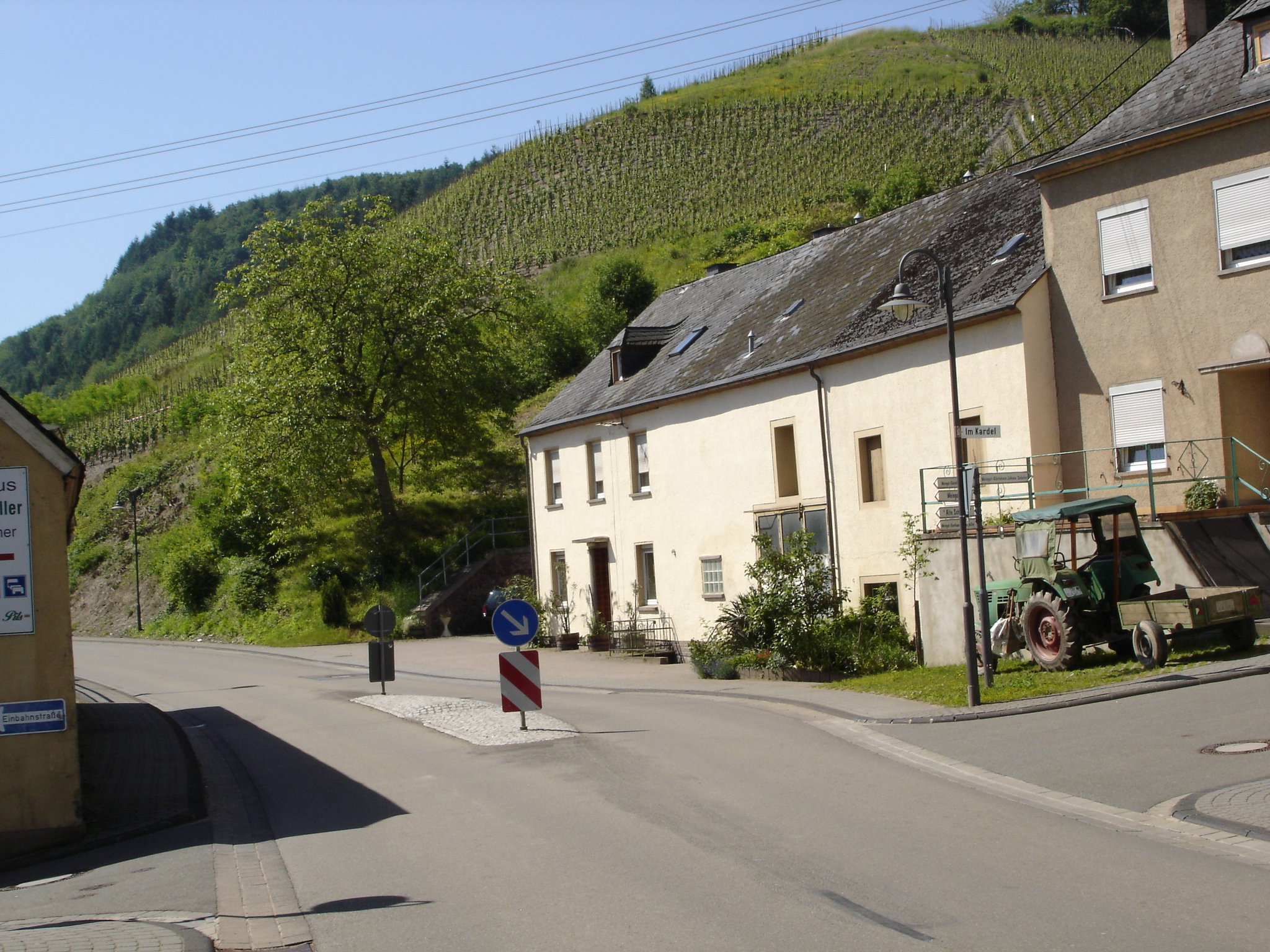 Die Hauptstrasse in Schleich